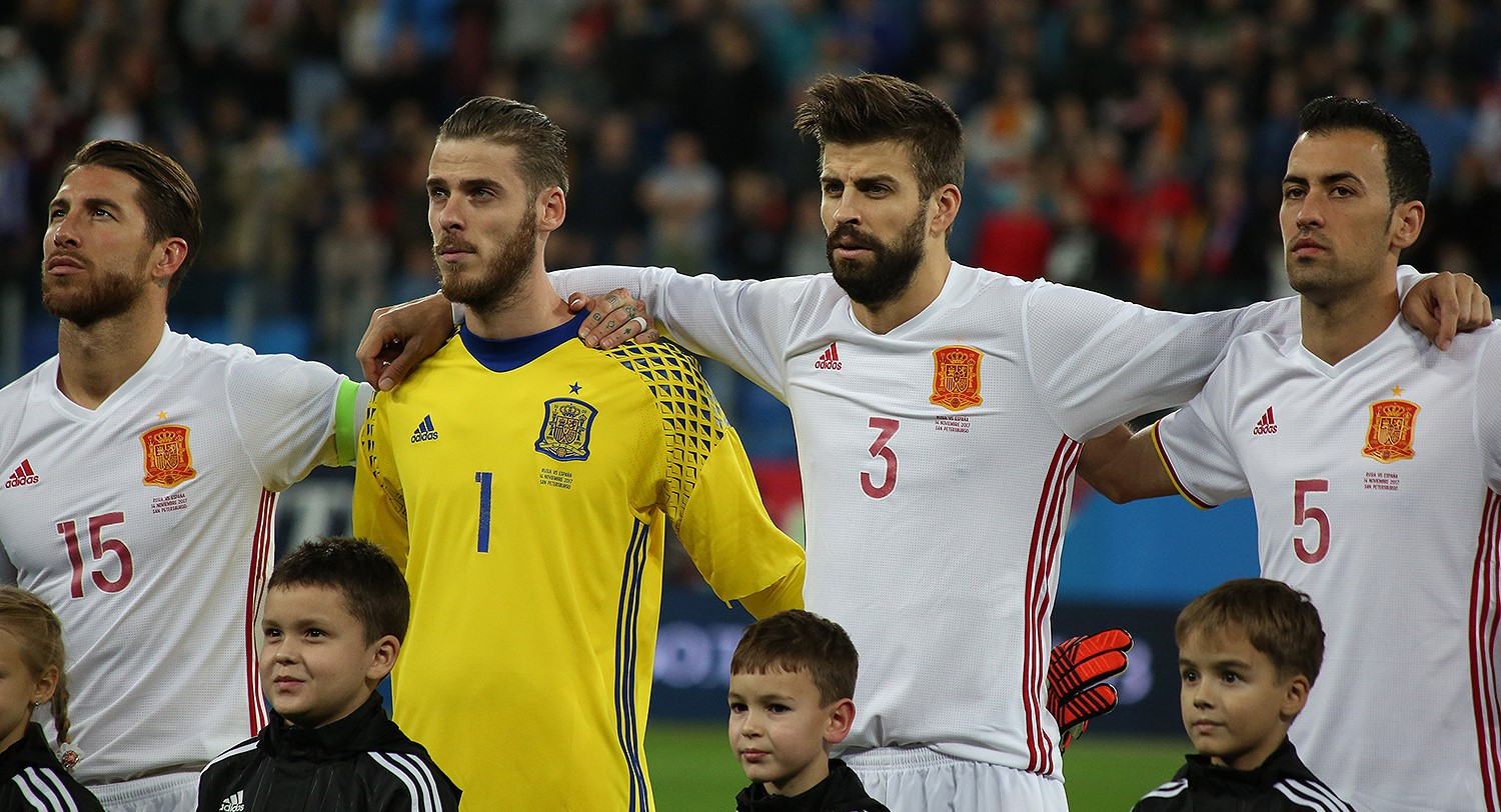 David de Gea, Gerard Piqué, Sergio Busquets, Sergio Ramos